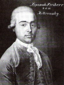 Jan Nepomuk hrabě Mitrovský z Mitrovic a Nemyšle